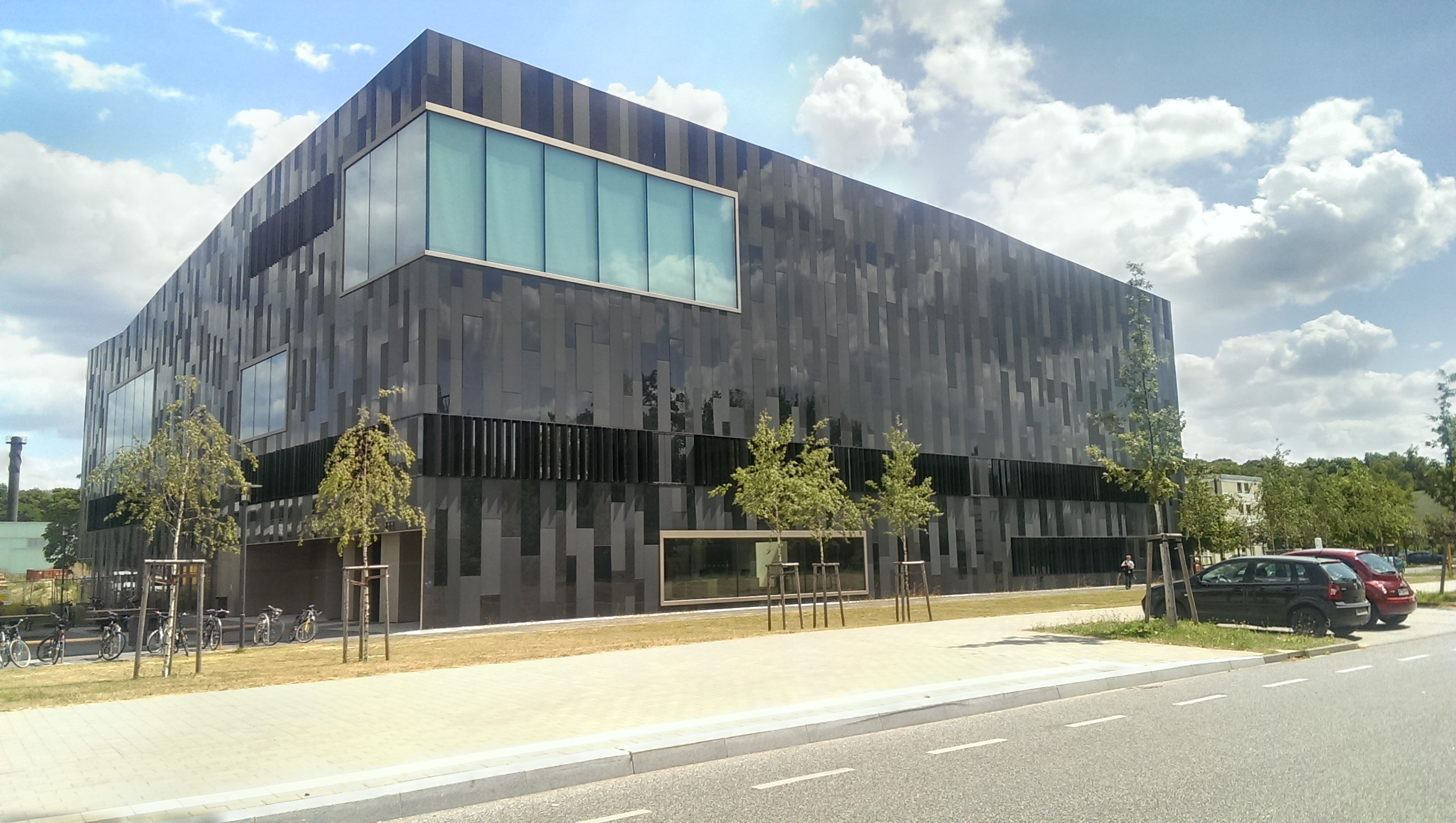 Informations- und Kommunikationszentrum der Universität Potsdam